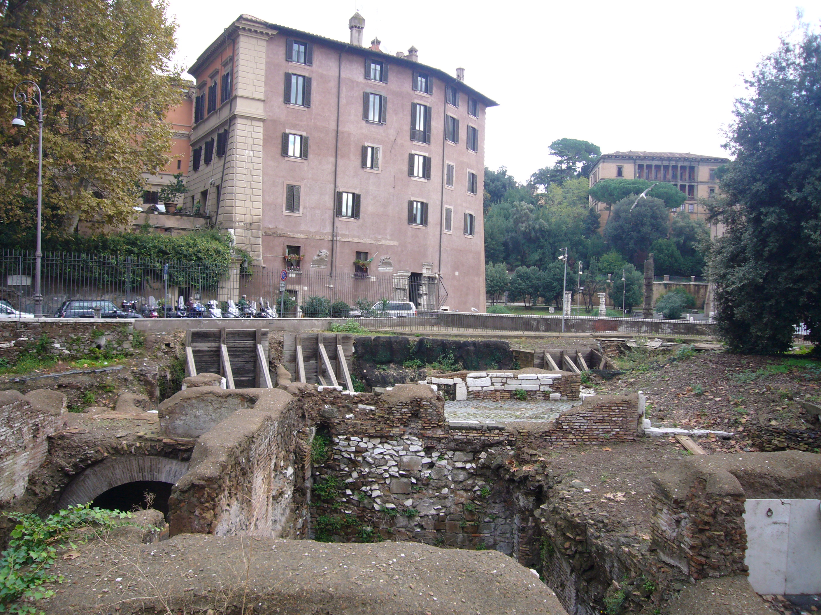 Roma, piazza di Monte Savello. Scavi delle case medievali Pierleoni e poi Savelli. Sul fondo, palazzo Orsini.